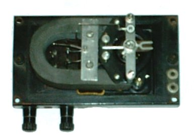 Relais ripetitore per telegrafia Siemens metà XX secolo